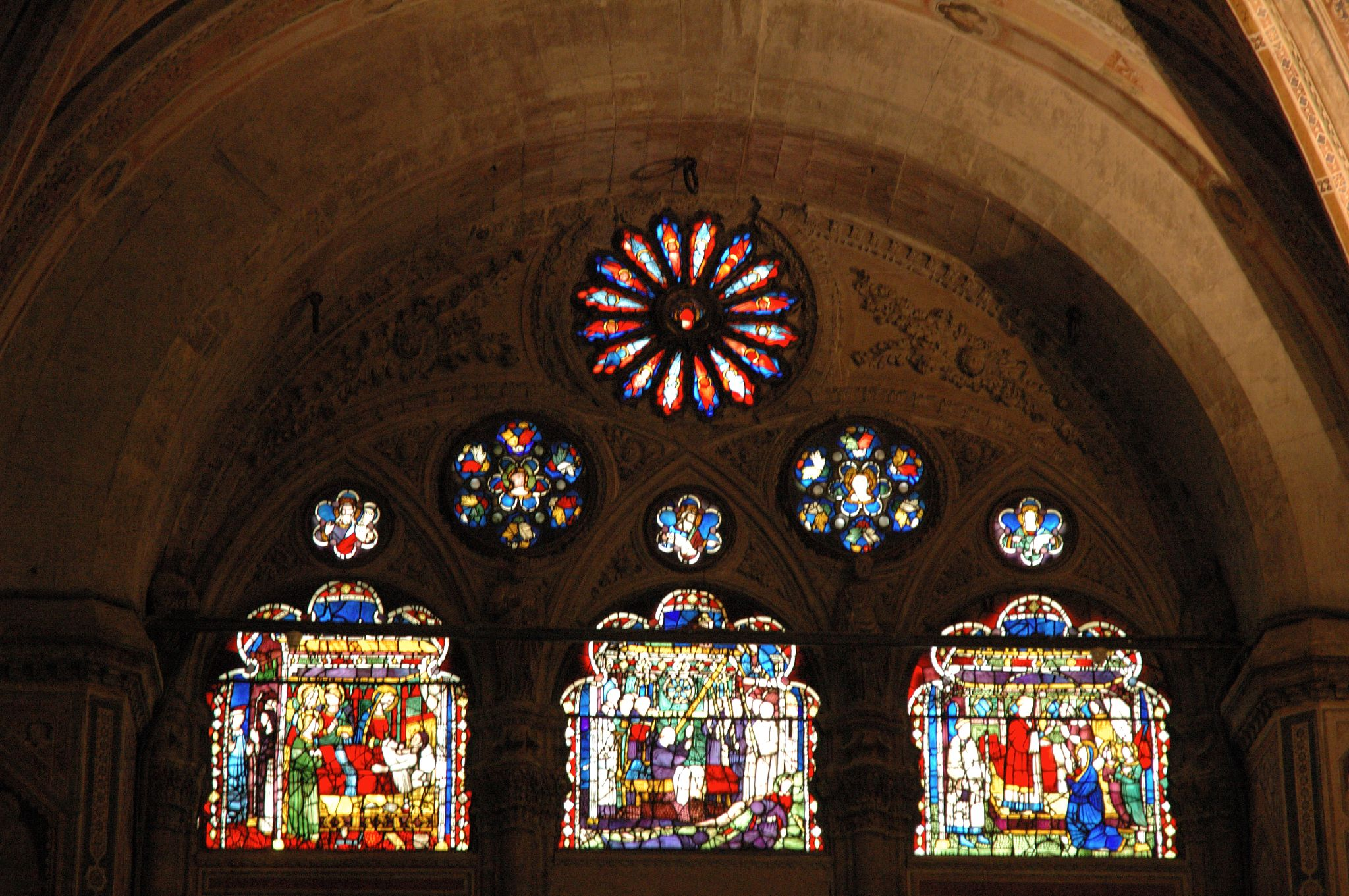 Pisa, Toscana, Italia